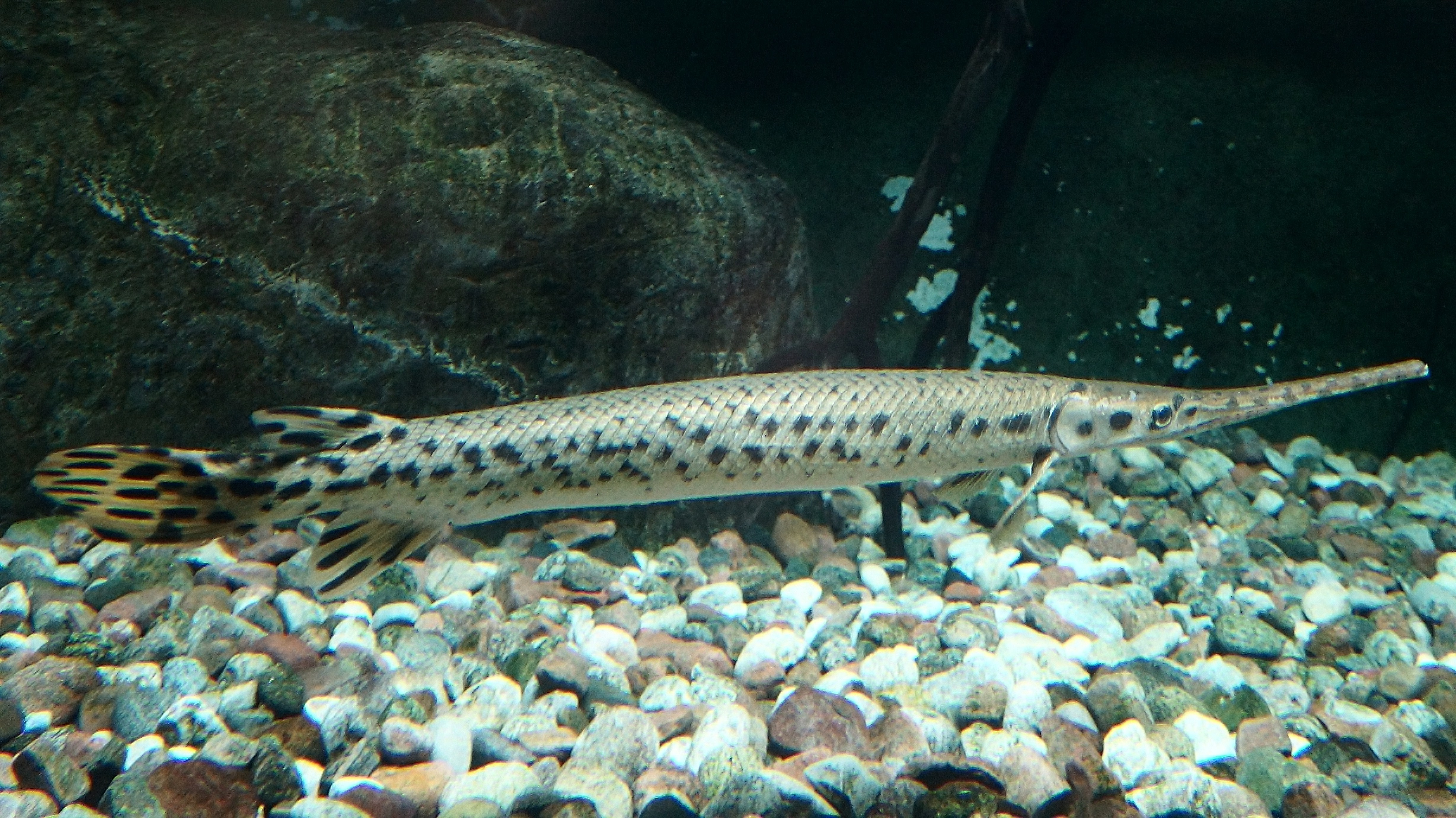 Longnose gar